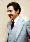 Laurence I. Barrett